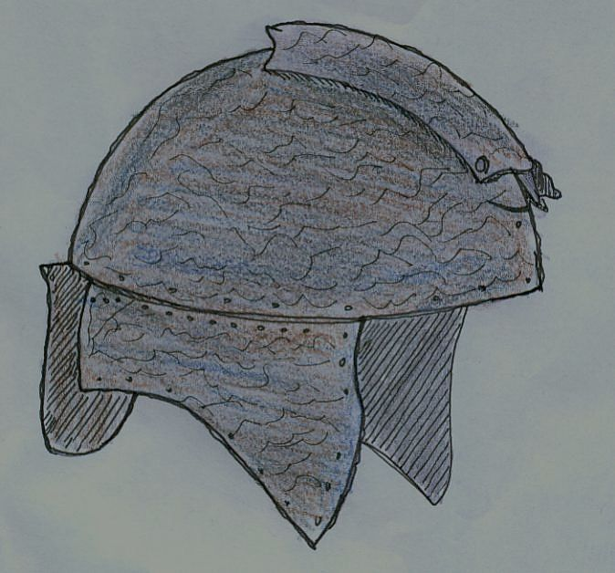 Skizze eines spätantiken Offiziershelms aus dem Kastell Iatrus (BG)